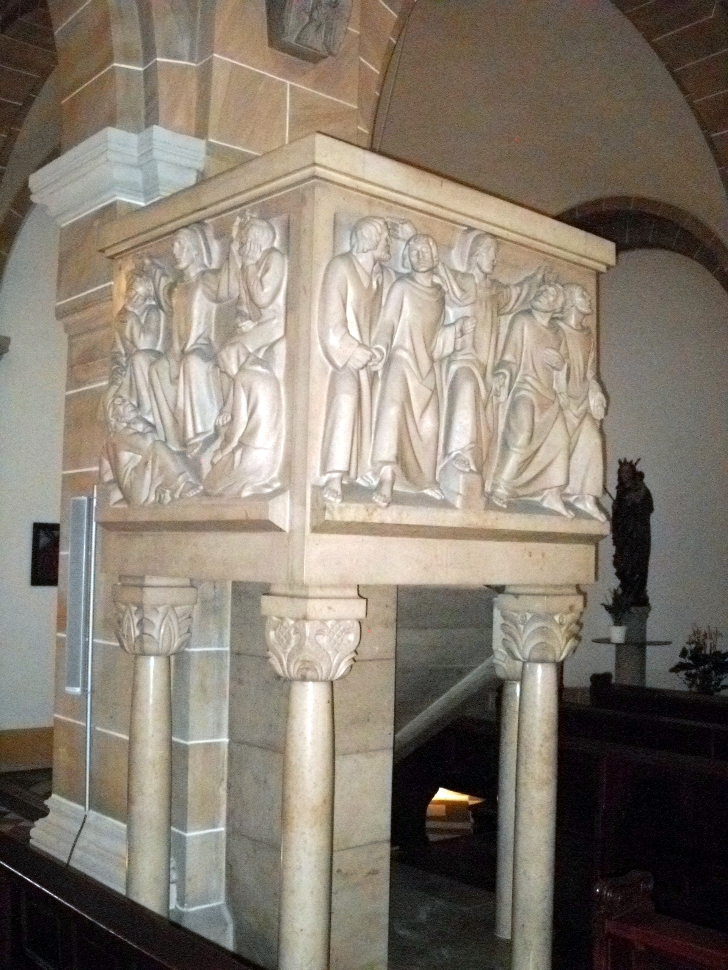 St. Raphael ist eine katholische Kirche im Heidelberger Stadtteil Neuenheim. Sie wurde in den Jahren 1903 bis 1905 im neuromanischen Stil errichtet und ist dem Erzengel Raphael geweiht.